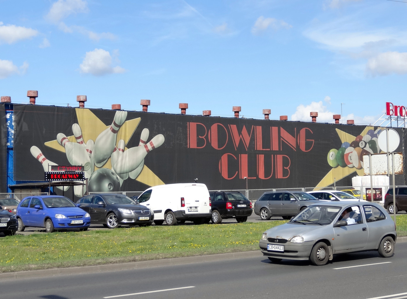 Klub "Broadway" kręgielnia przy ul. Kamiennej w Bydgoszczy